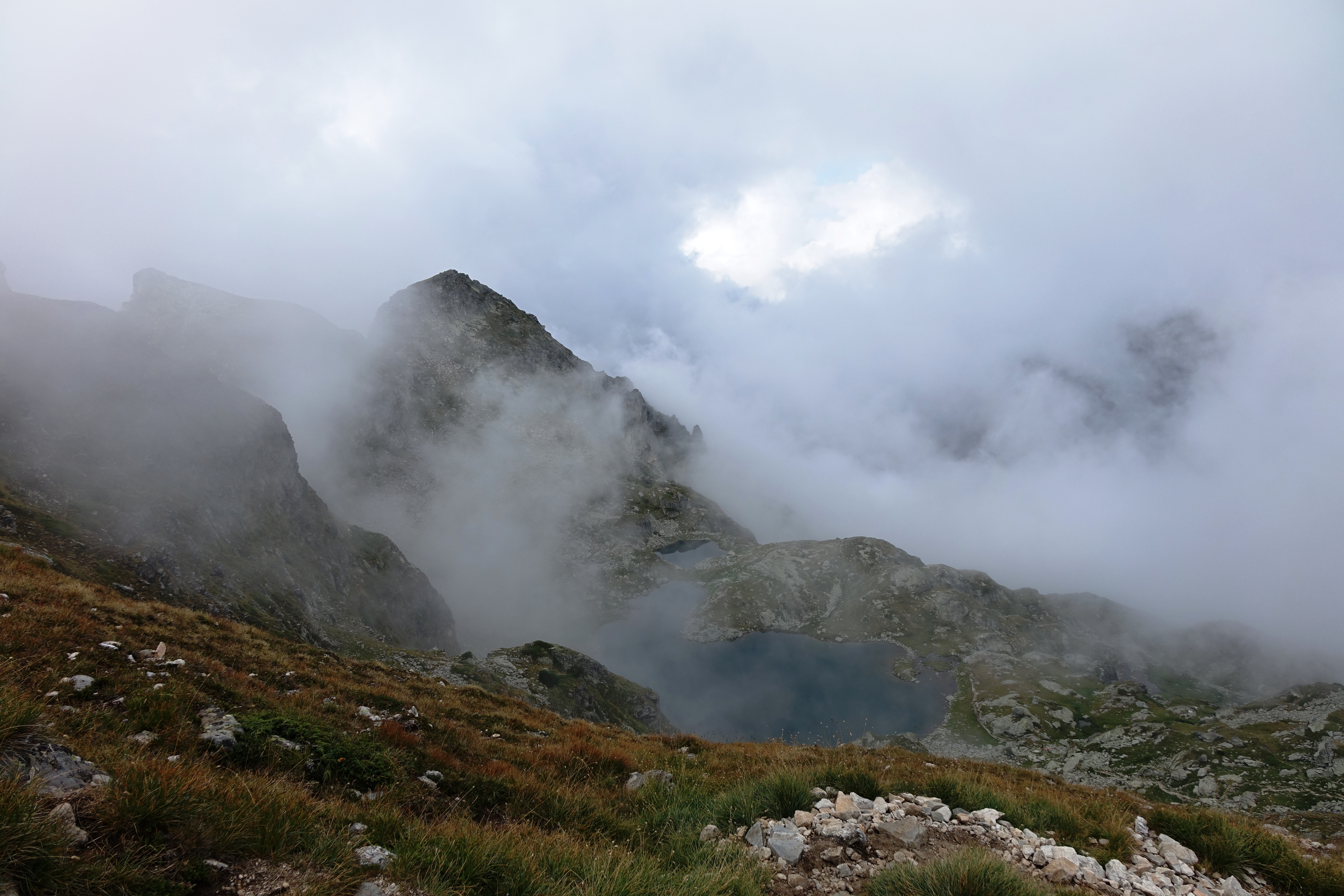 Рила, Еленини (Еленски) езера